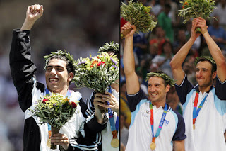 La agenda del argentino promedio mutó. Era sábado y, claro, si durante la semana madrugaste, había que esforzarse un día más, por la indiscutible razón de que, en horas, un grupo de hombres tendría la oportunidad del choque con la historia, de afrontar la chance de admirar con los ojos propios la alegoría del éxito. Y se hizo. Argentina protagonizó aquel 28 de agosto y lo convirtió en el día más propio, el del orgullo por lo hecho. Ese, señores, es un día que todo amante del deporte debería recordar.